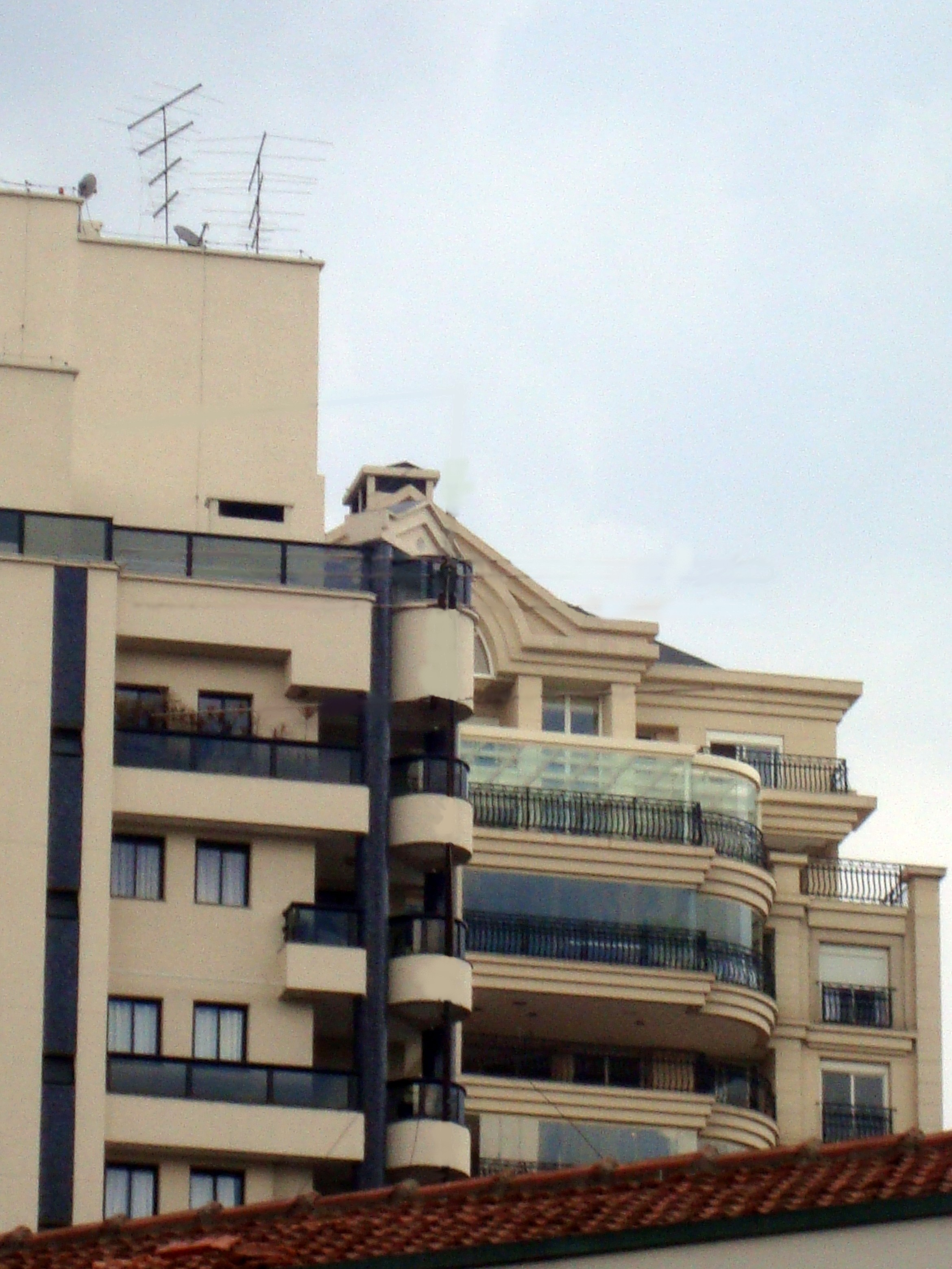 Foto de coberturas (Penthouse apartment) no Alto de Santana, Zona Norte da cidade de São Paulo, Brasil